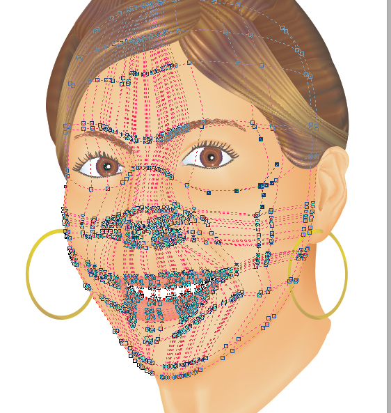 Ilustración en relleno de malla con la vista de malla activada